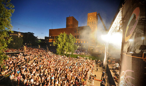 Publikum. Melafestivalen